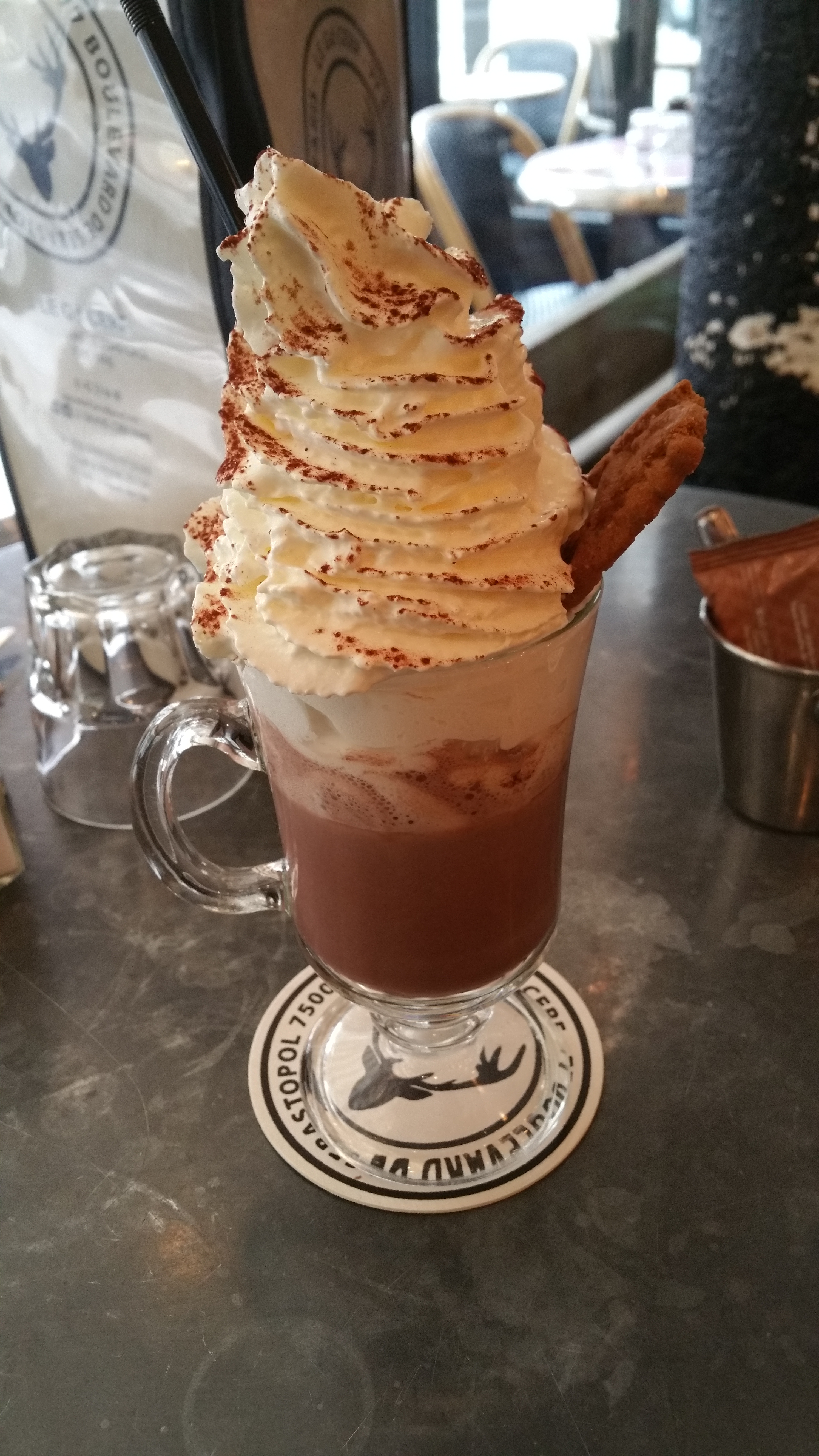 Chocolat viennois servi au Grand Cerf à Paris.